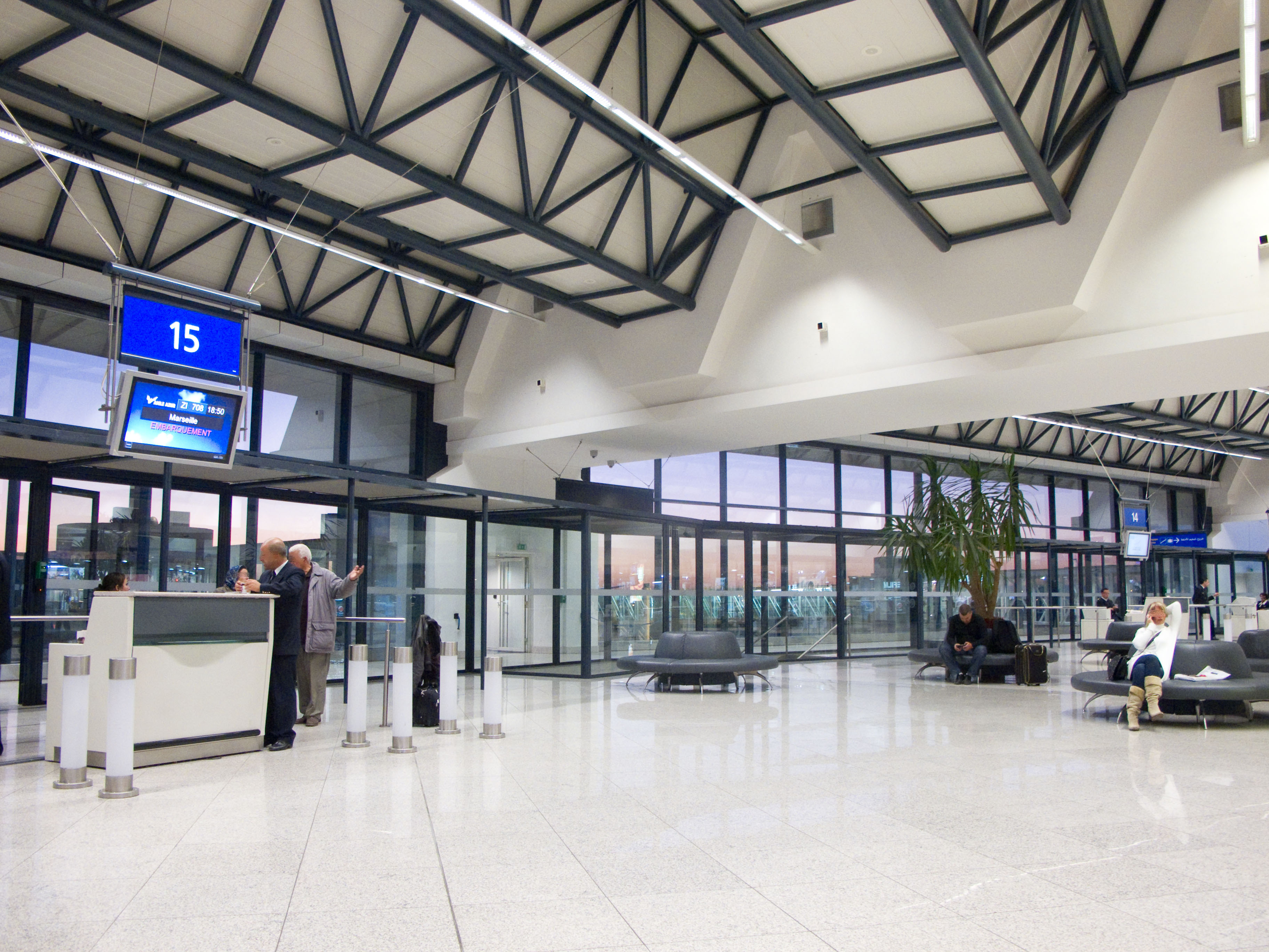 Aéroport Houari Boumediene, Dar El Beida, Alger, Algérie (nouvel aérogare, zone d'embarquement 1)